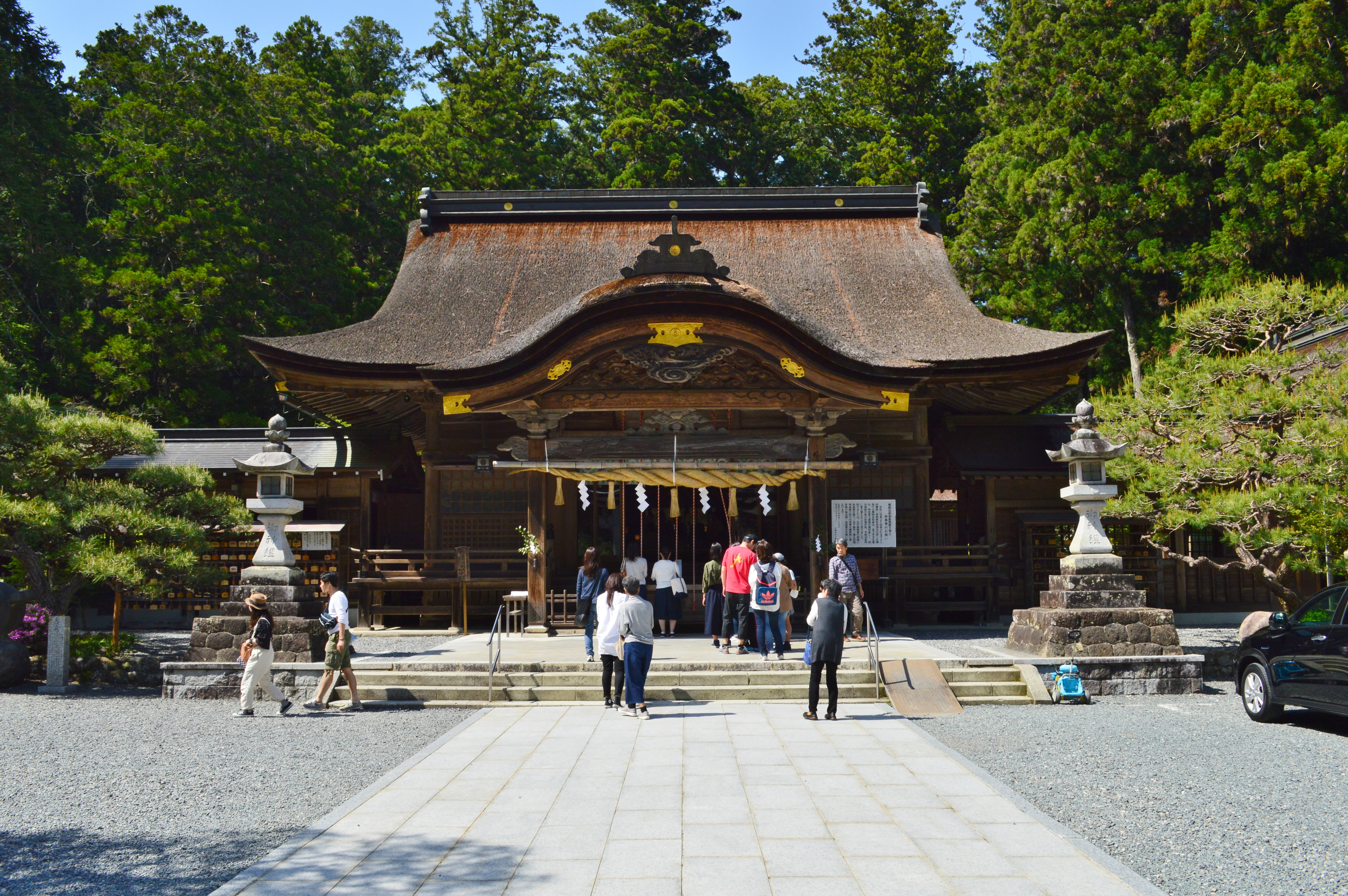 小國神社 拝殿